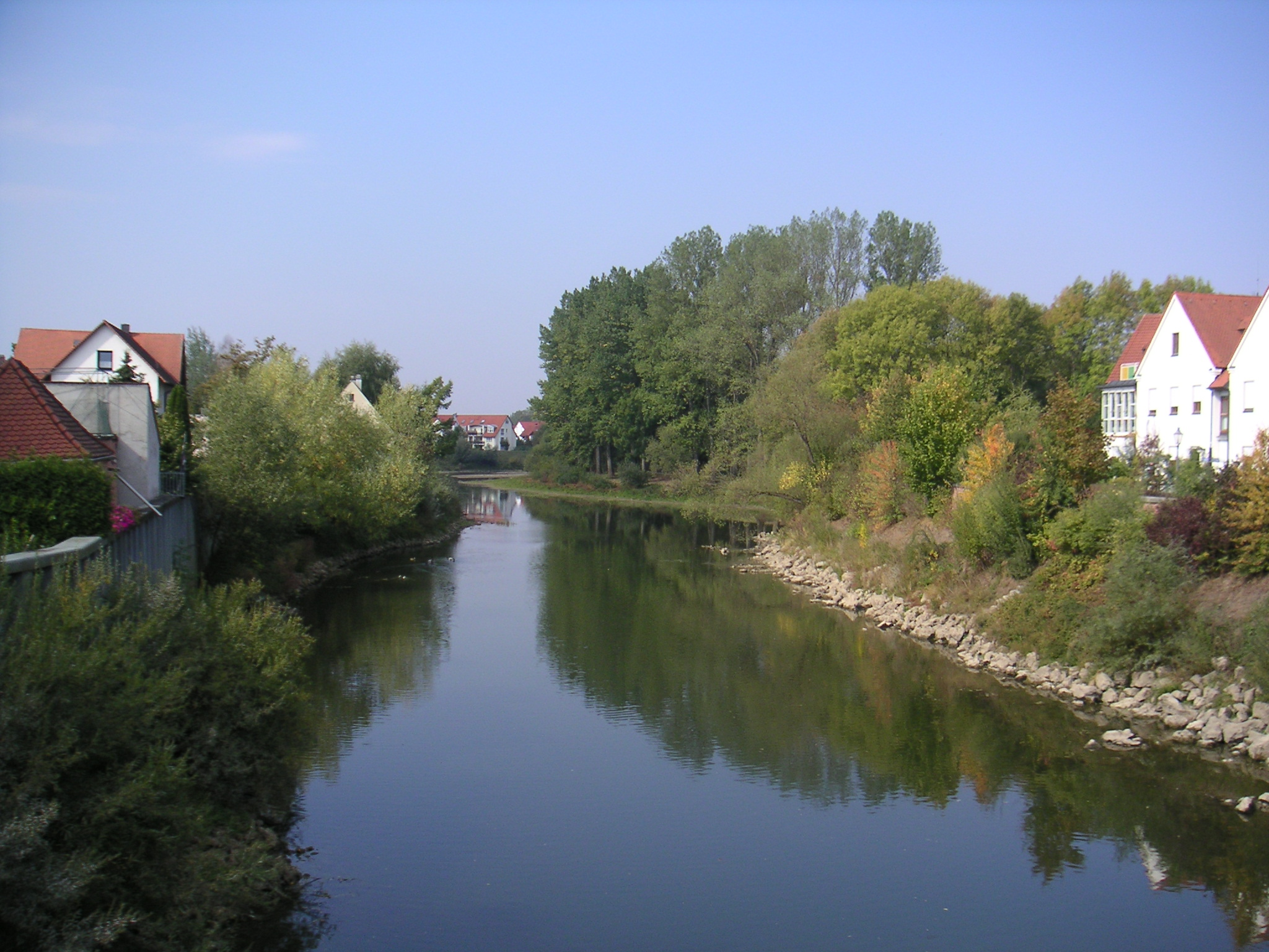 2003年9月27日 本人撮影 ドナウヴェルト Category:ドイツの画像